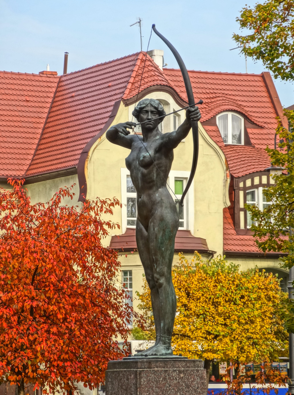 Rzeźba Łuczniczki autorstwa prof. Ferdinanda Lepcke odsłonięta w 1910 r. w Bydgoszczy